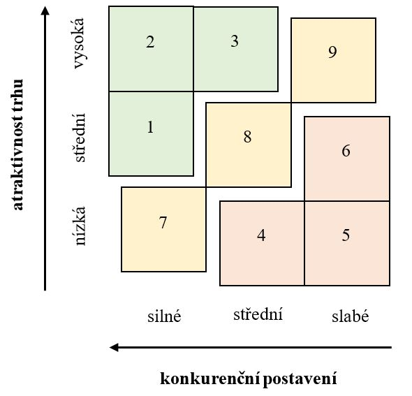 Matice GE zobrazující jednotlivé zóny na základě atraktivnosti trhu a konkurenčního postavení.